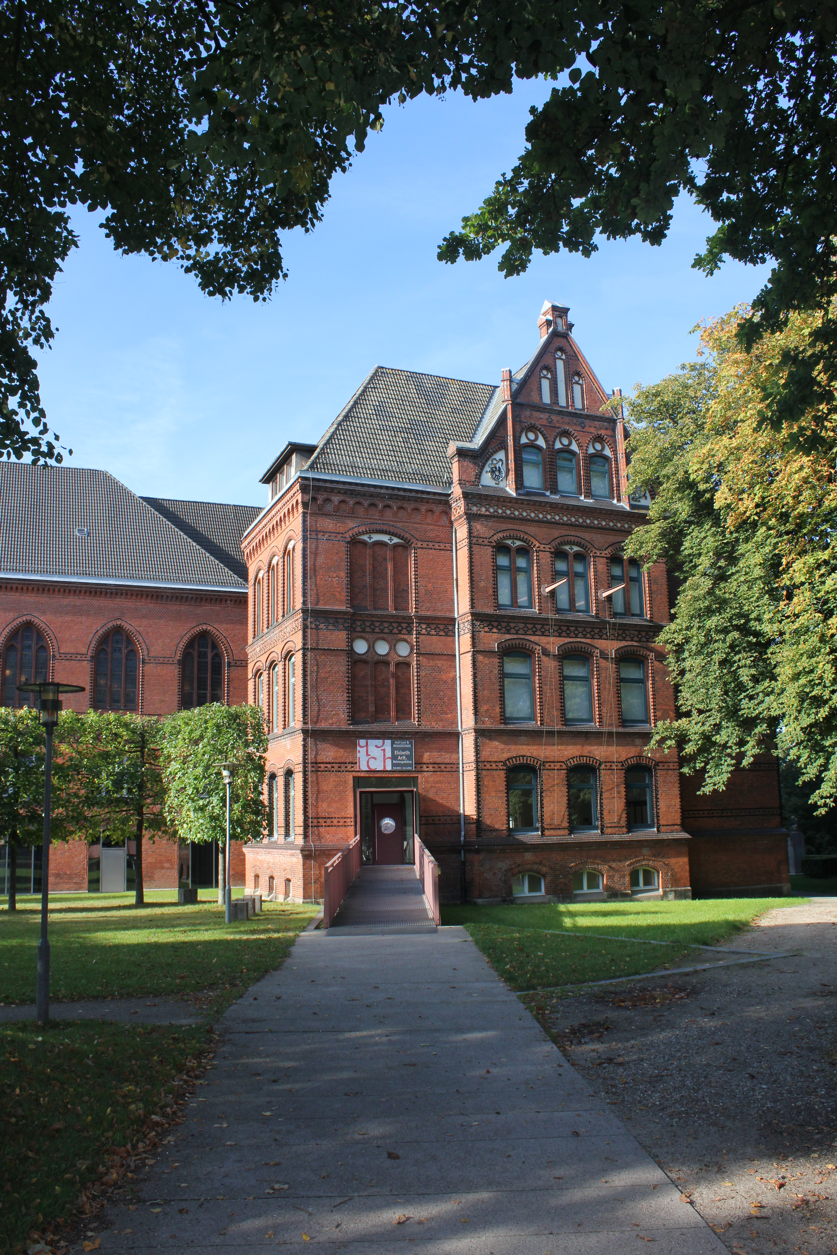 Hans-Christiansen-Haus (Flensburg 2013), Bild 01